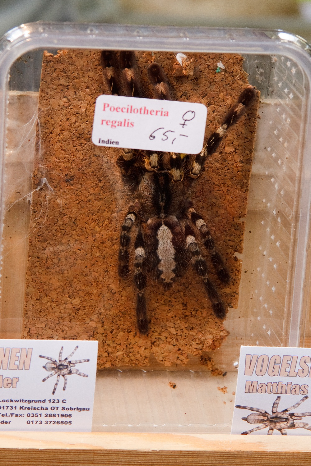 Terraristika, Zentralhallen Hamm, Datum/Uhrzeit: 12.09.2009 10:41:49